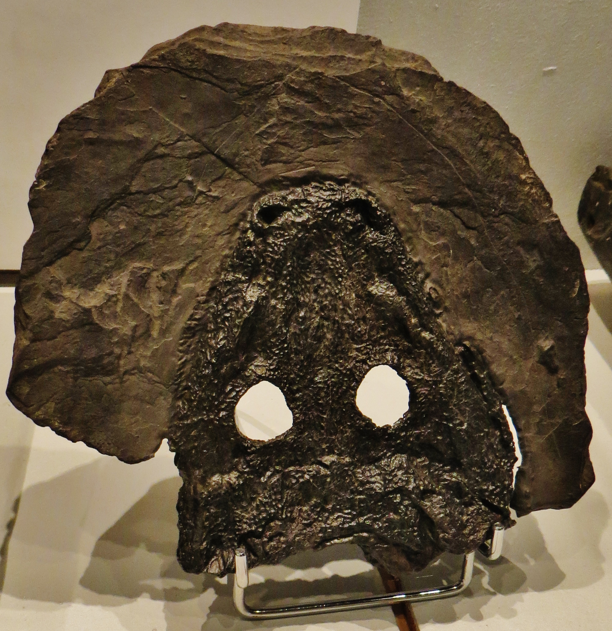 Fossil - Took the picture at Museum of Natural History, Autun